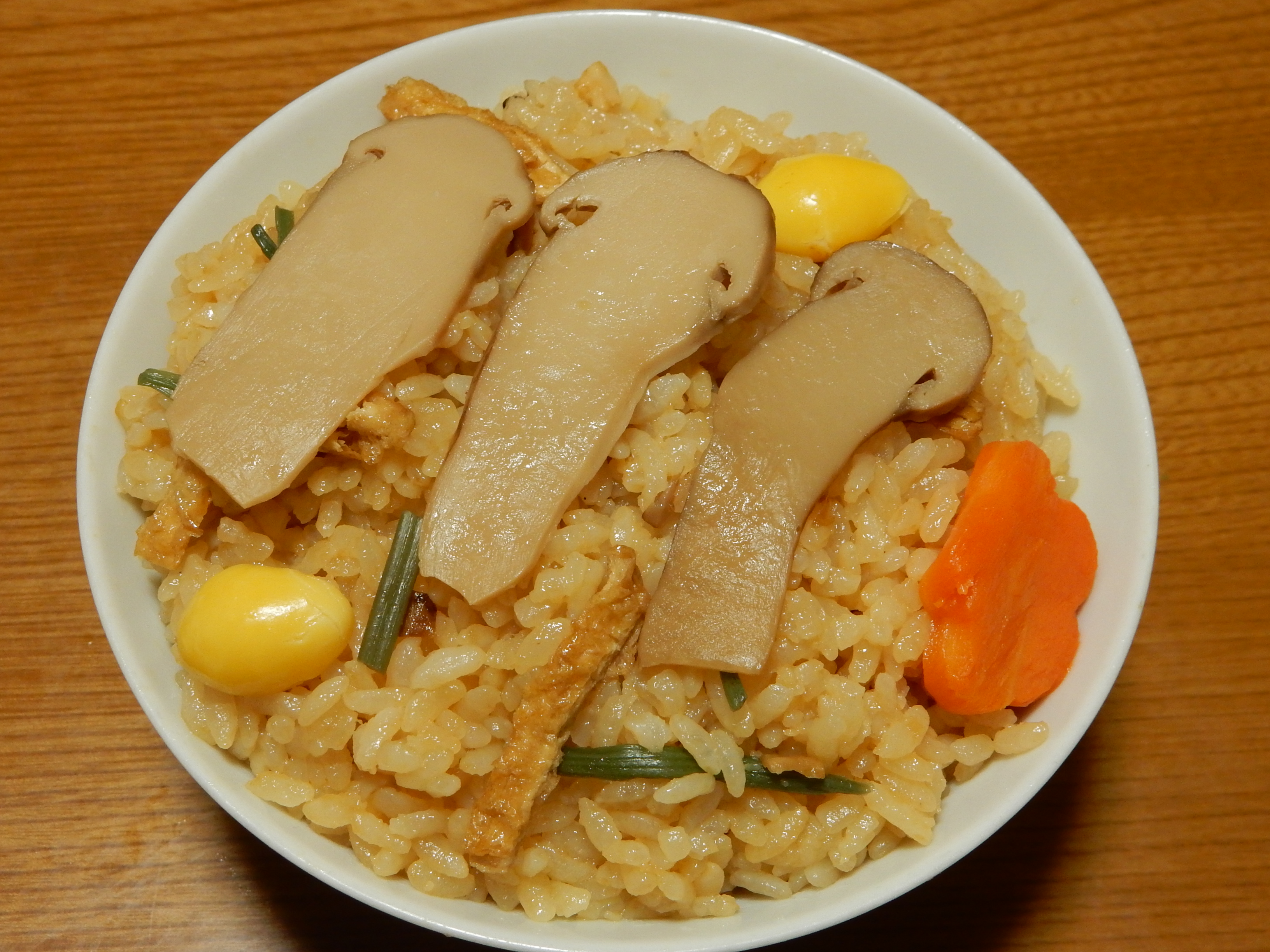 炊き込み御飯の一種、松茸御飯。黄色の物体は銀杏。